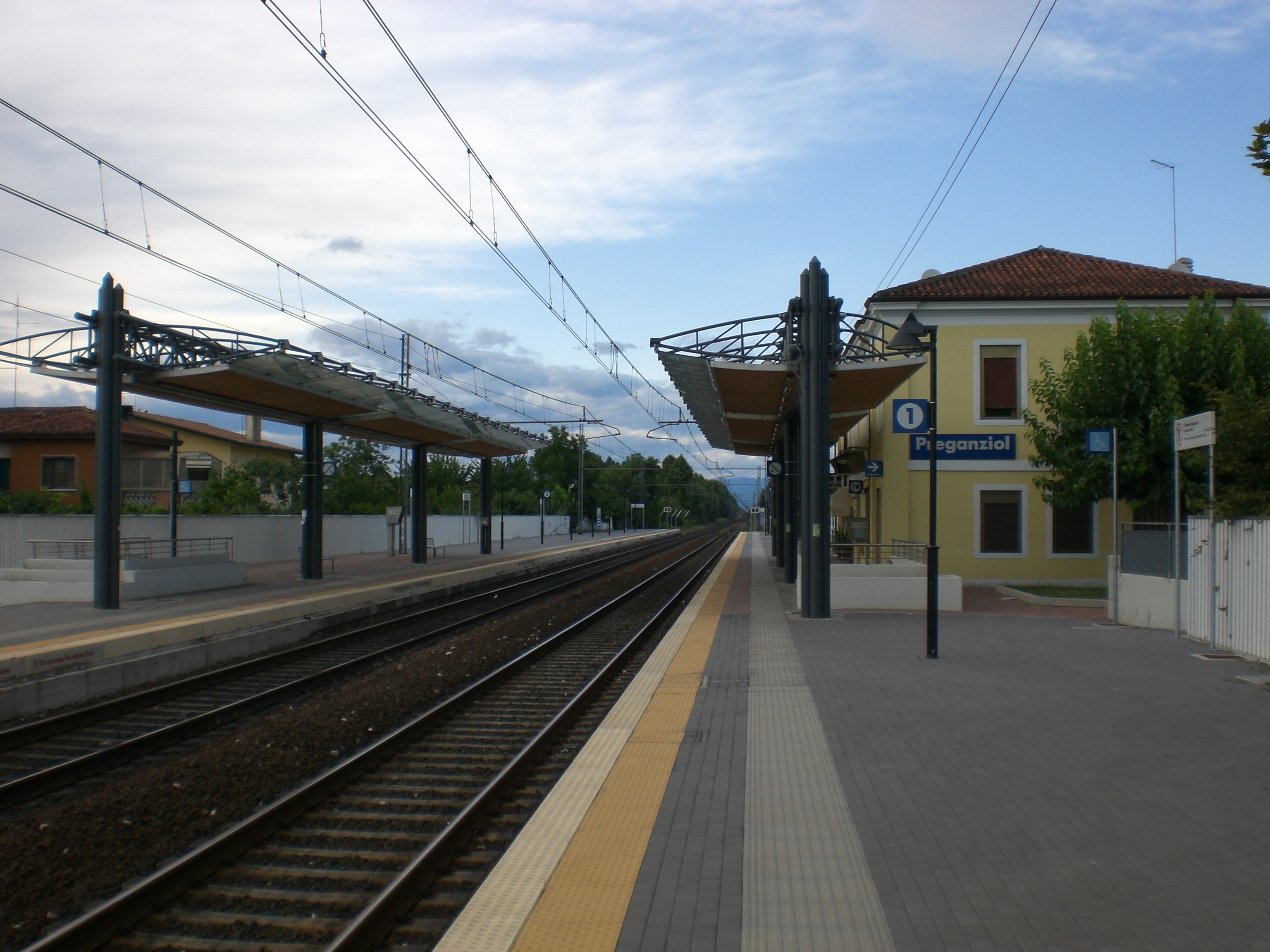 FS Preganziol